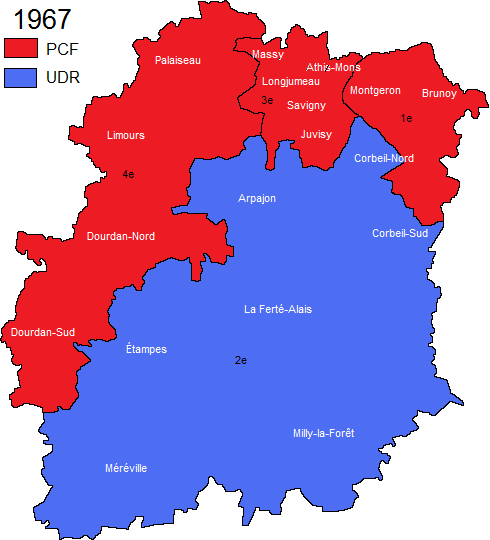 Carte politique de l'Essonne (91) après les élections législatives de 1967.